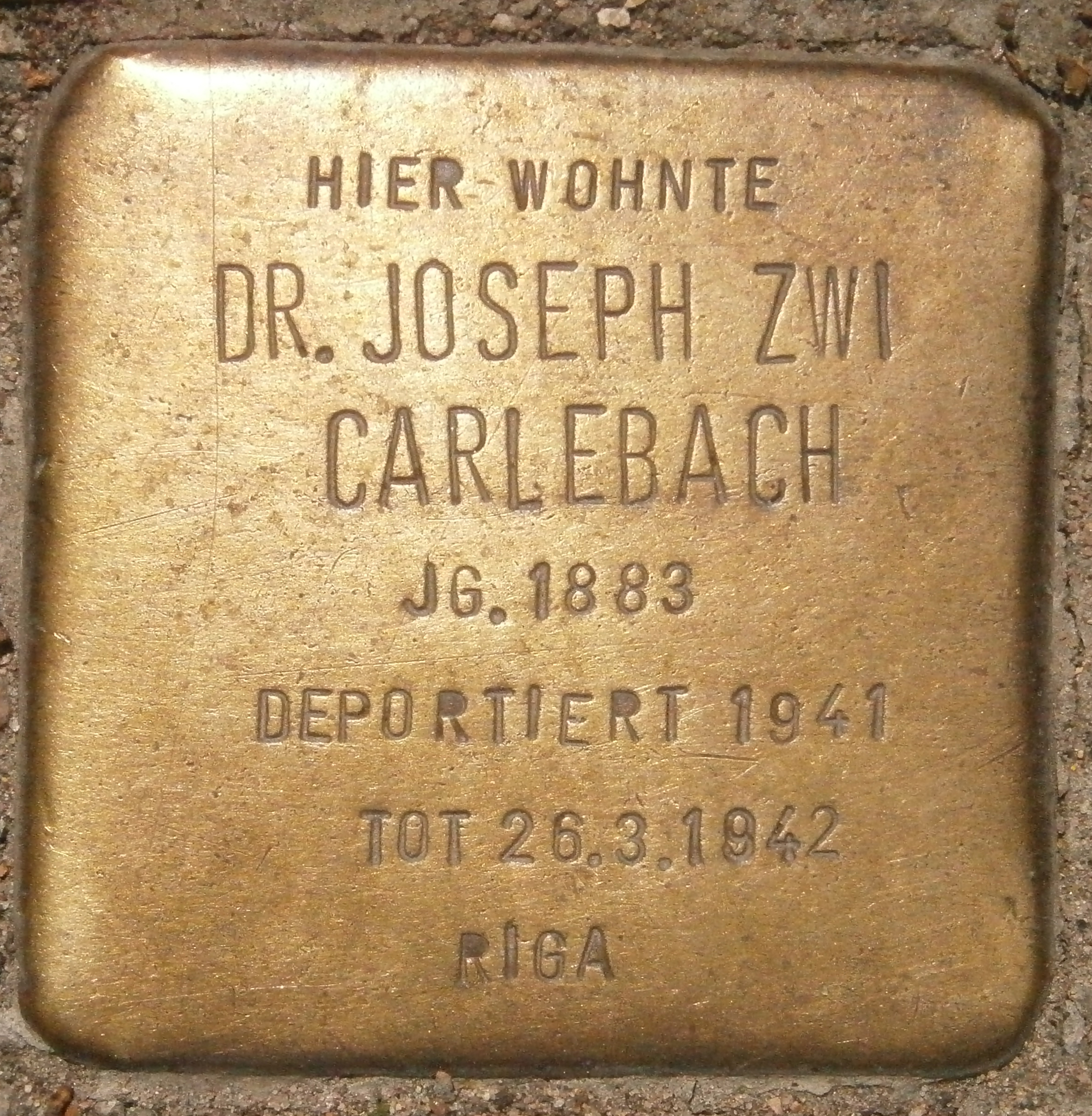 Stolperstein für Joseph Zwi Carlebach